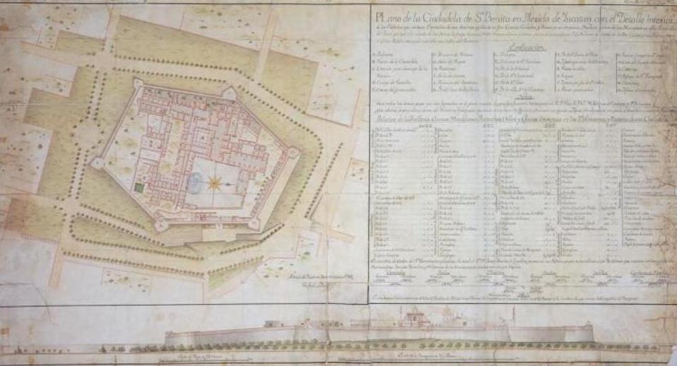 Plano de la Ciudadela de San Benito en 1788.